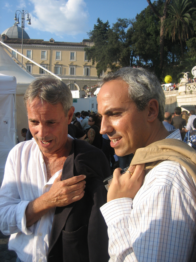 Marco Fumagalli e Marco Di Lello alla manifestazione nazionale per la libertà d'informazione.